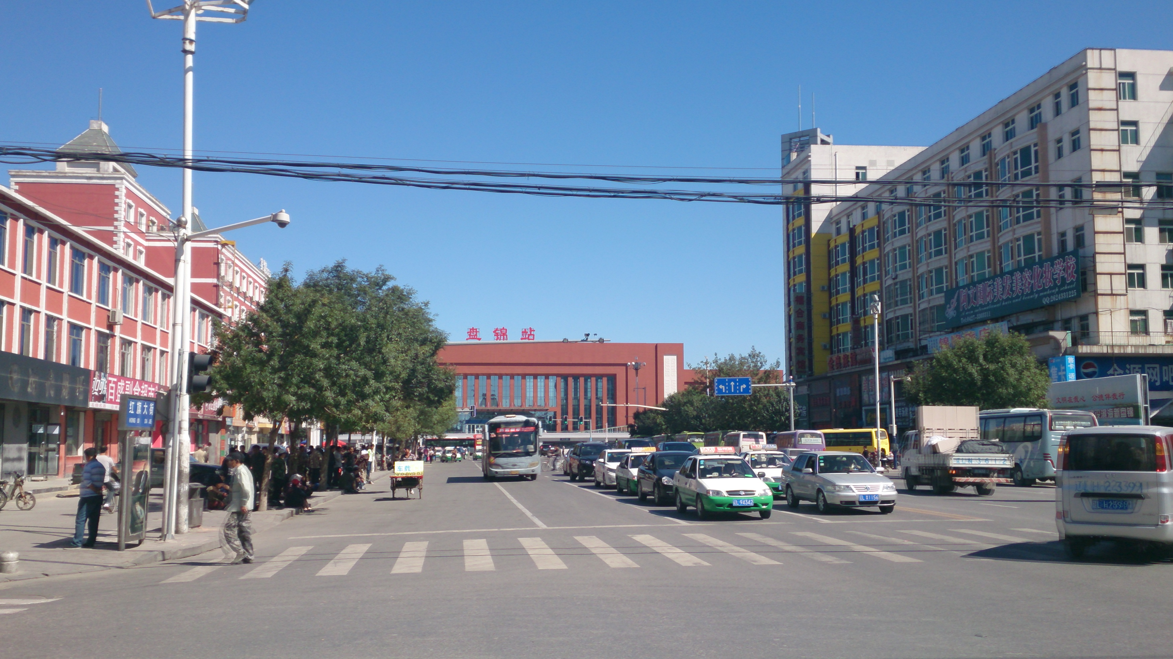 盘锦火车站